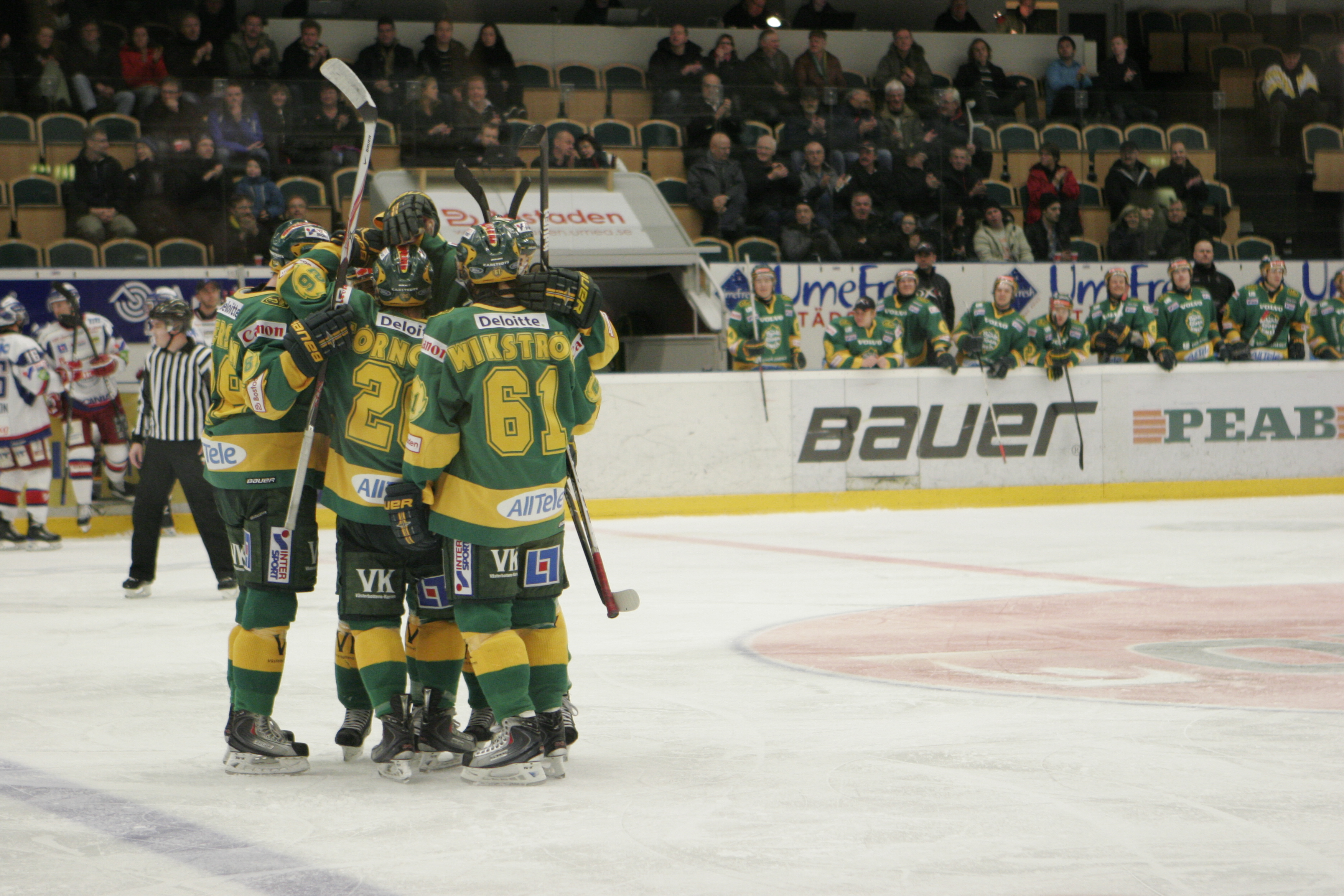 IF Björklöven has just scored a goal against IK Oskarshamn in the Swedish Hockeyallsvenskan. IF Björklöven won, 8-2, in Umeå Arena.